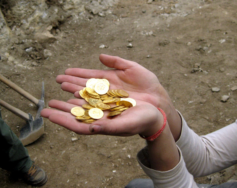 חלק ממטמון של 264 מטבעות זהב מימי הרקליוס. נתגלה בחניון גבעתי בעיר דוד בירושלים בדצמבר 2008